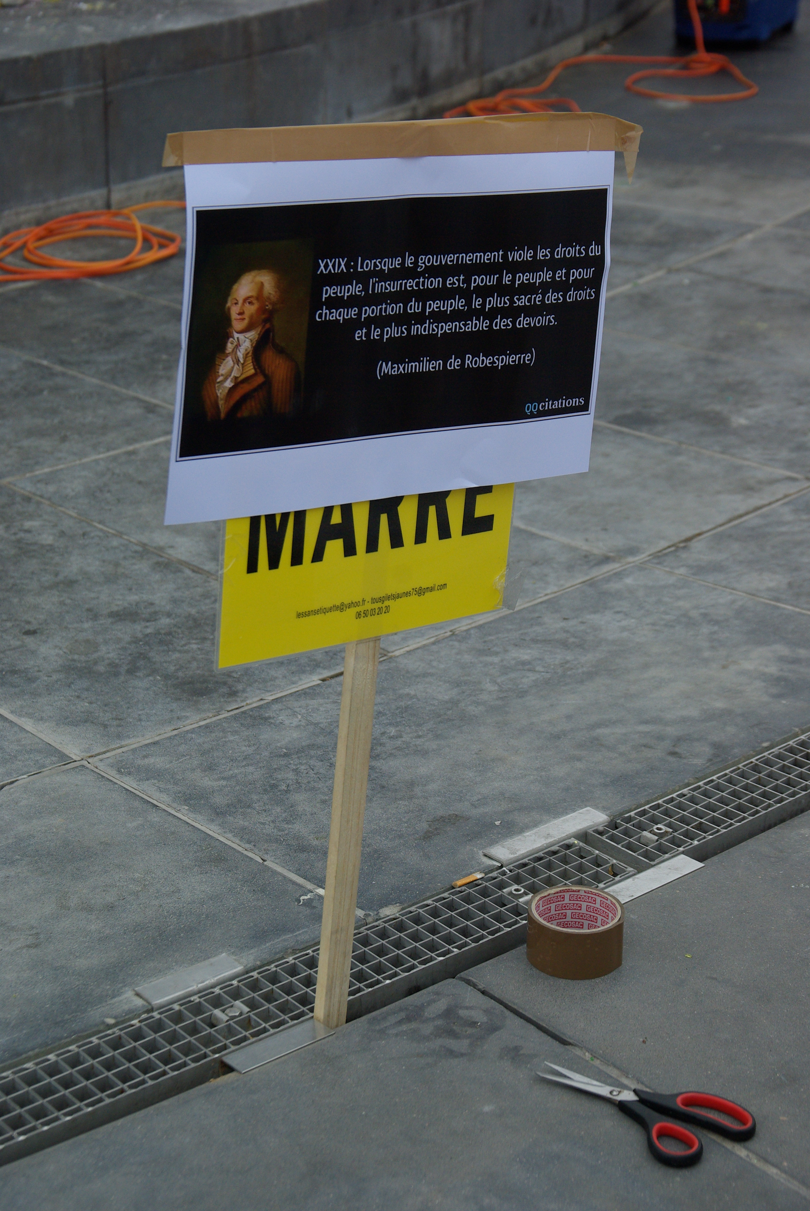 pancarte qu'on pouvait lire place de la République à Paris le 5 janvier 2019 XXIX : Lorsque le gouvernement viole les droits du peuple, l’insurrection est, pour le peuple et pour chaque portion du peuple, le plus sacré des droits et le plus indispensable des devoirs.